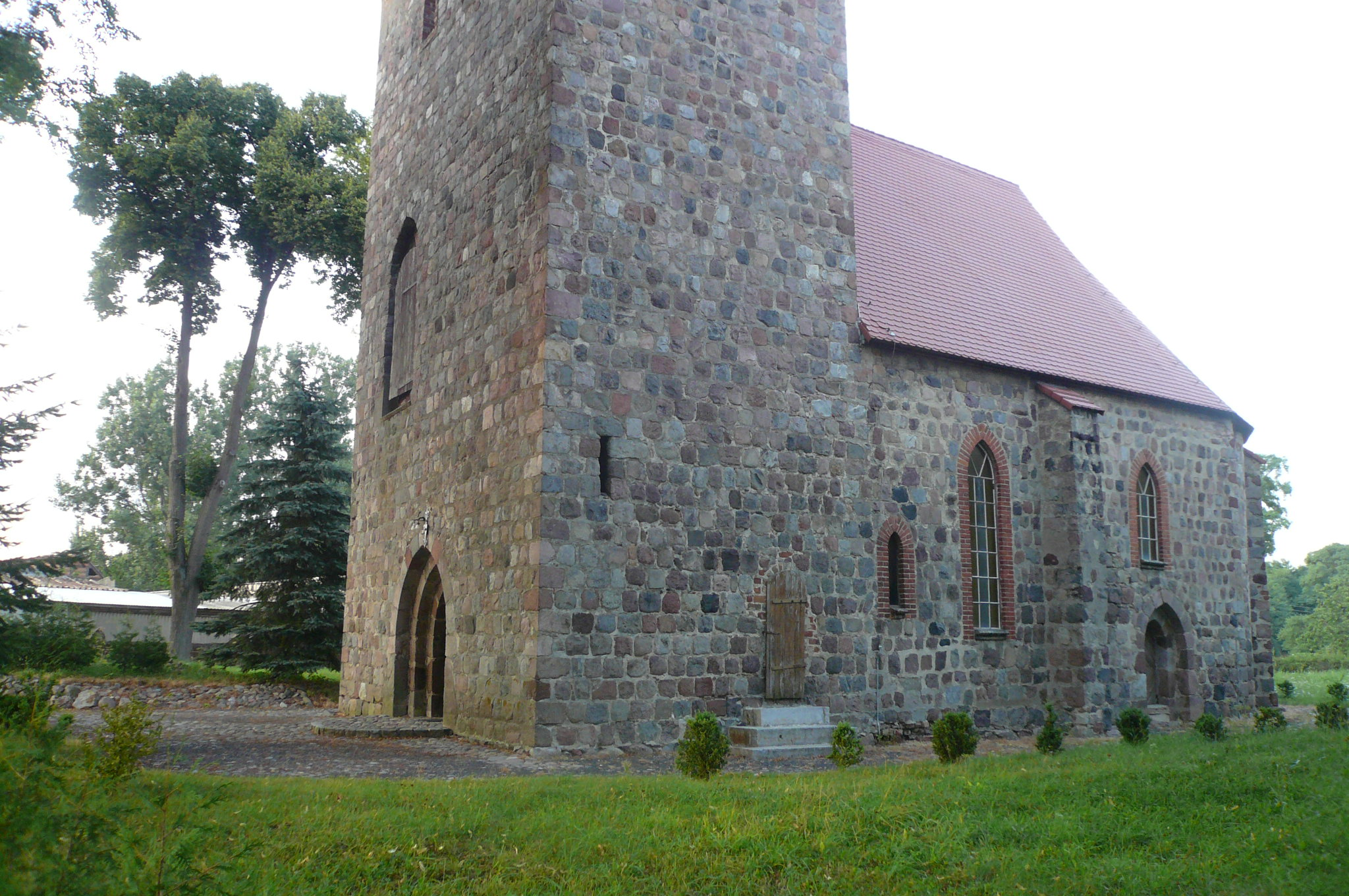 Dolsko - rzymskokatolicki kościół filialny p.w. św. Elżbiety, 2 poł. XIII (od południowego zachodu, widoczne wejście boczne oraz wejście na wieżę)